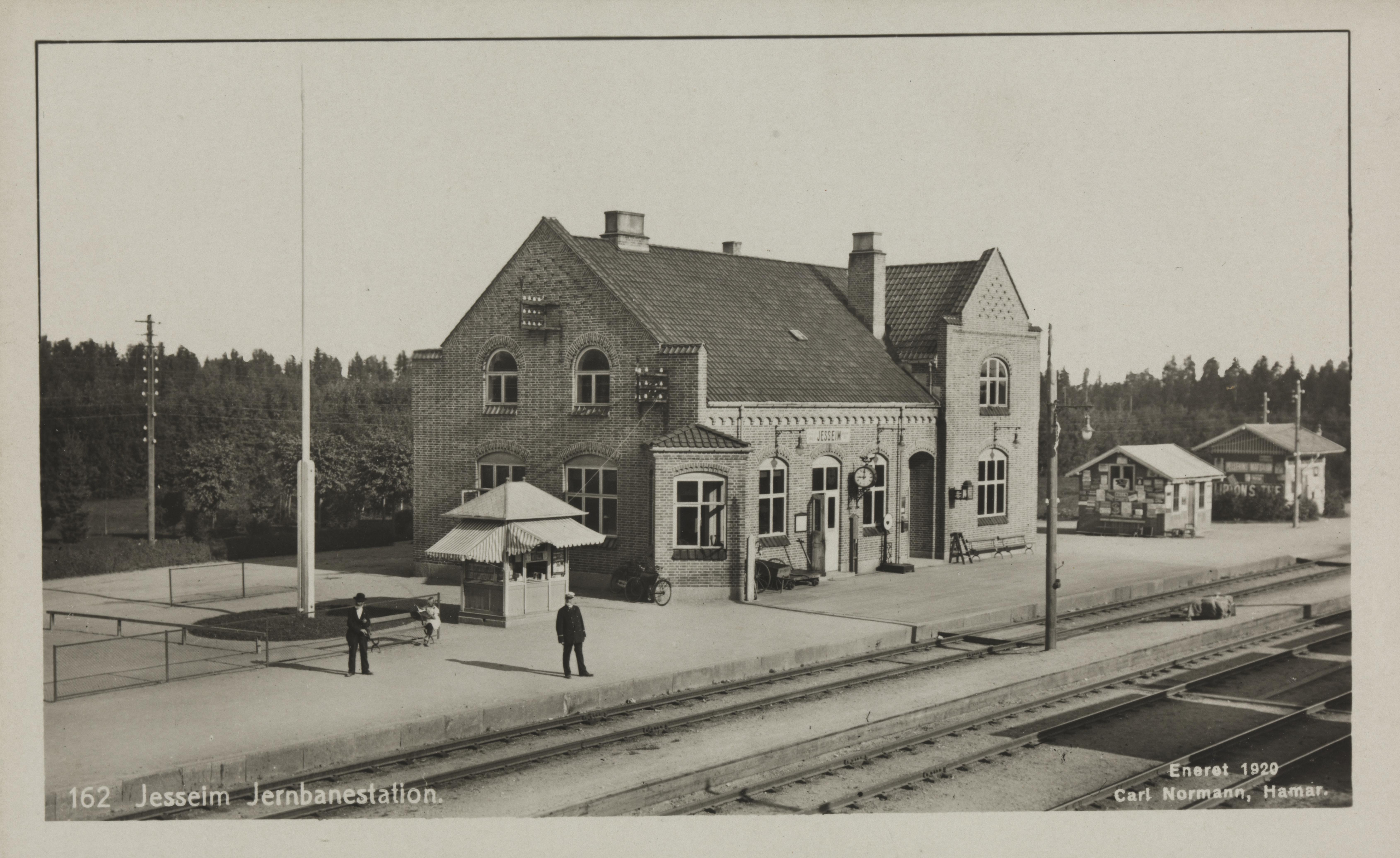 Bildet er hentet fra Nasjonalbibliotekets bildesamling Jessheim,Jessheim stasjon, Ullensaker, Akershus